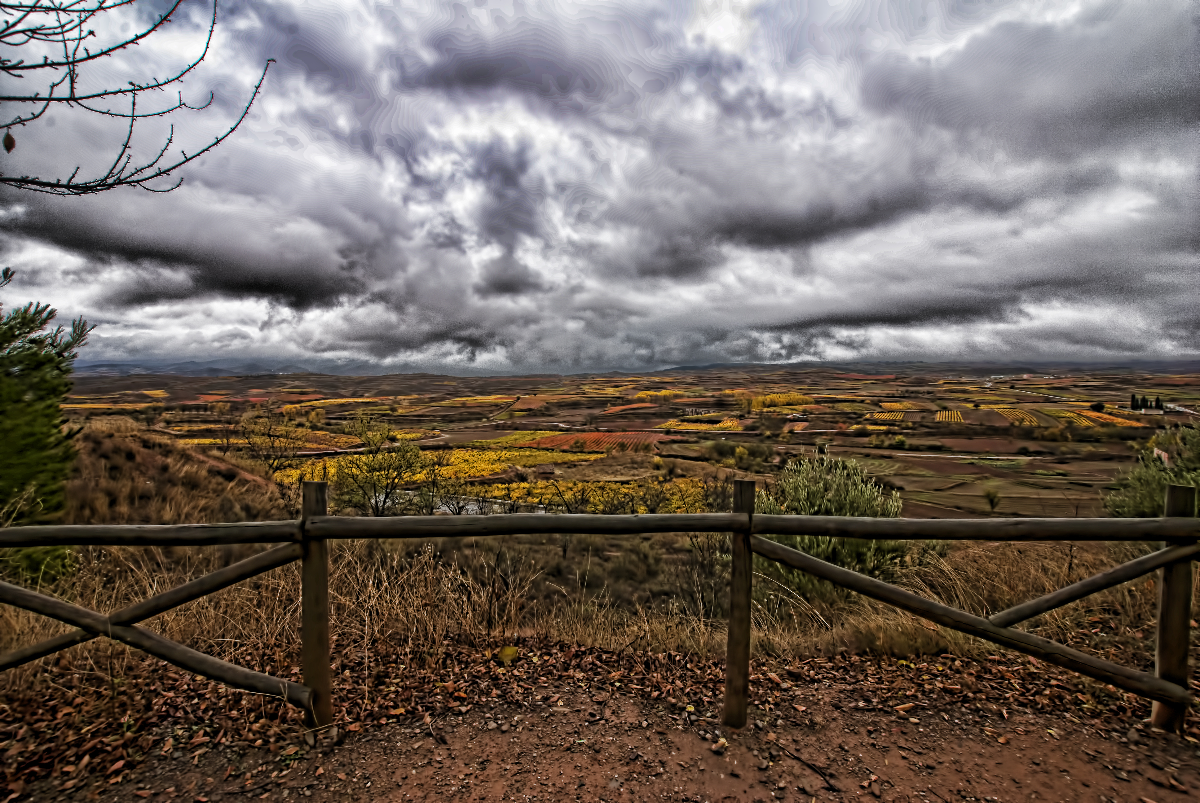 Autumn in La Rioja